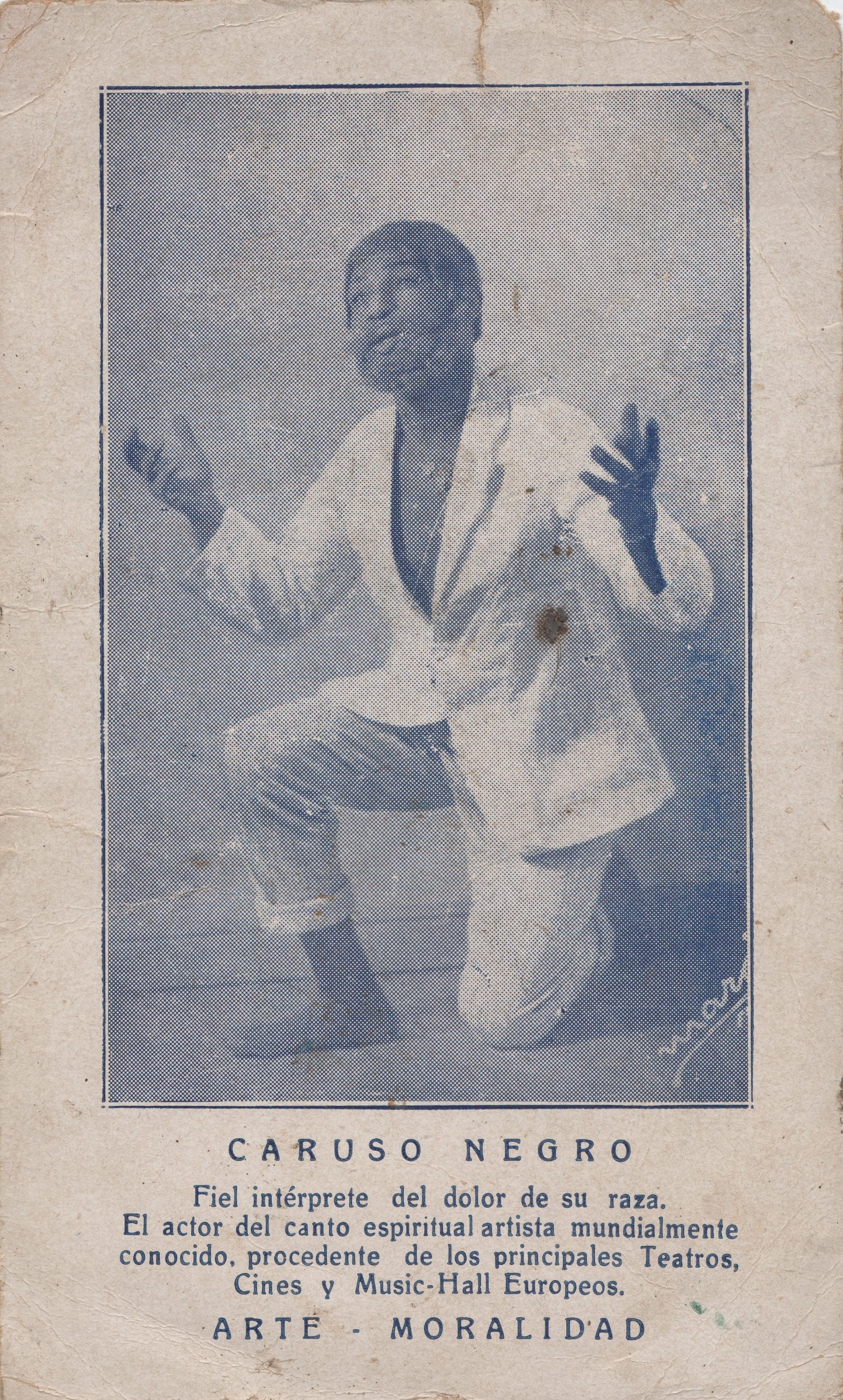 Afiche publicitario de Oscar Rorra luego de su regreso de Europa.